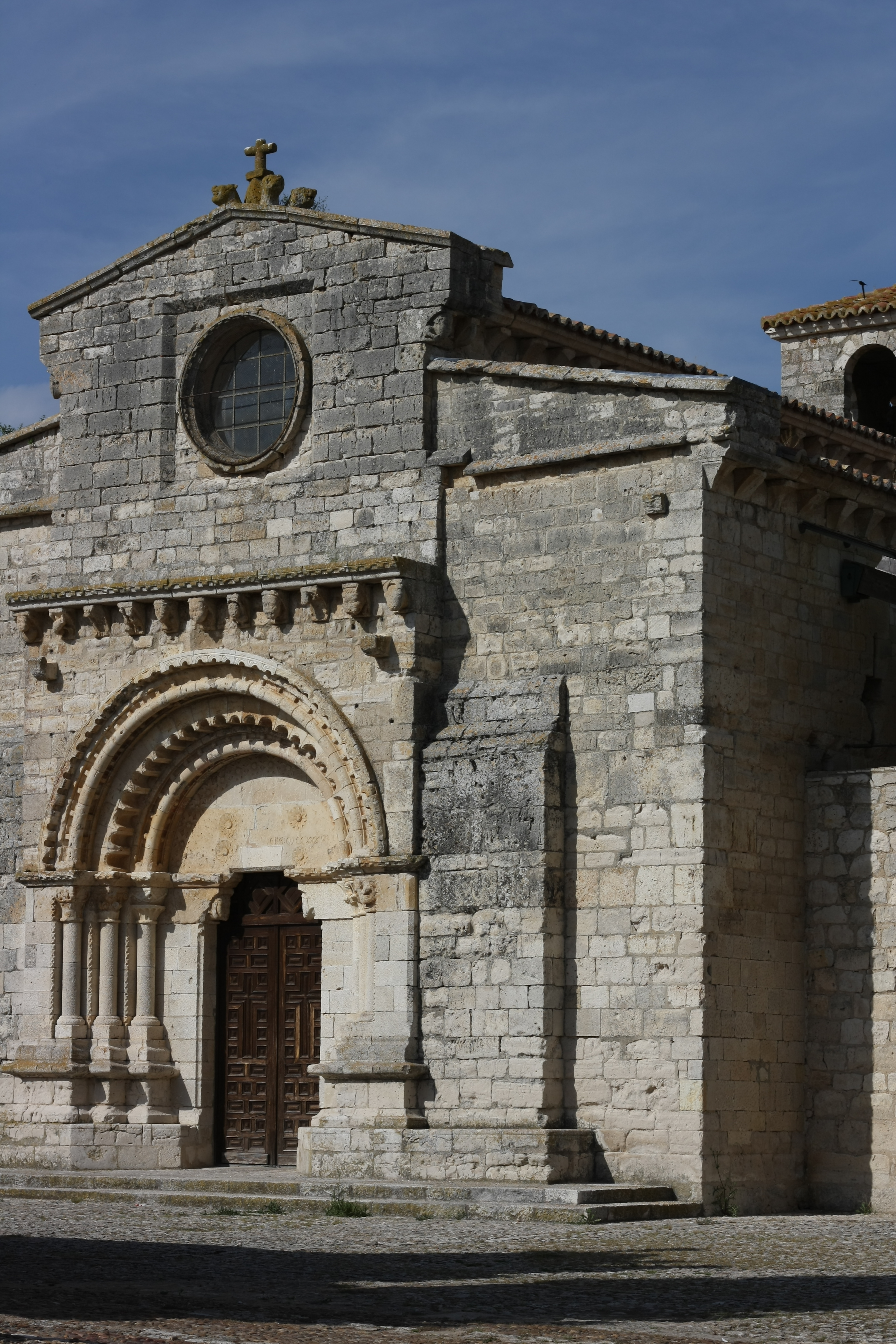 Santa María de Wamba, Ansicht von Westen